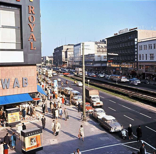 Blick in die Tauentzienstraße in Berlin, links der Royal Palast.